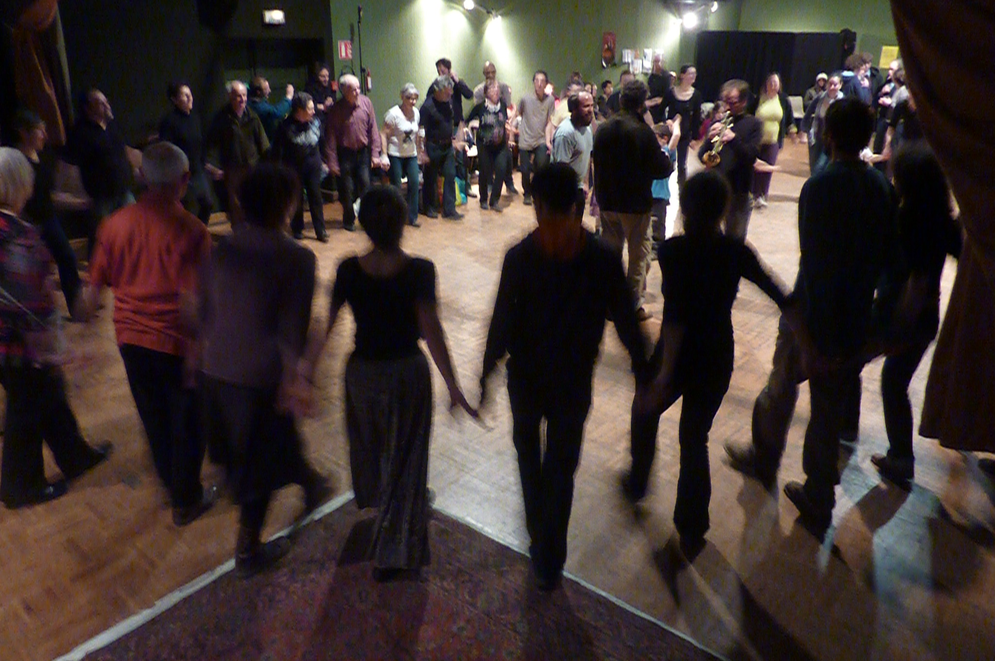 France, Langon - Fest Noz